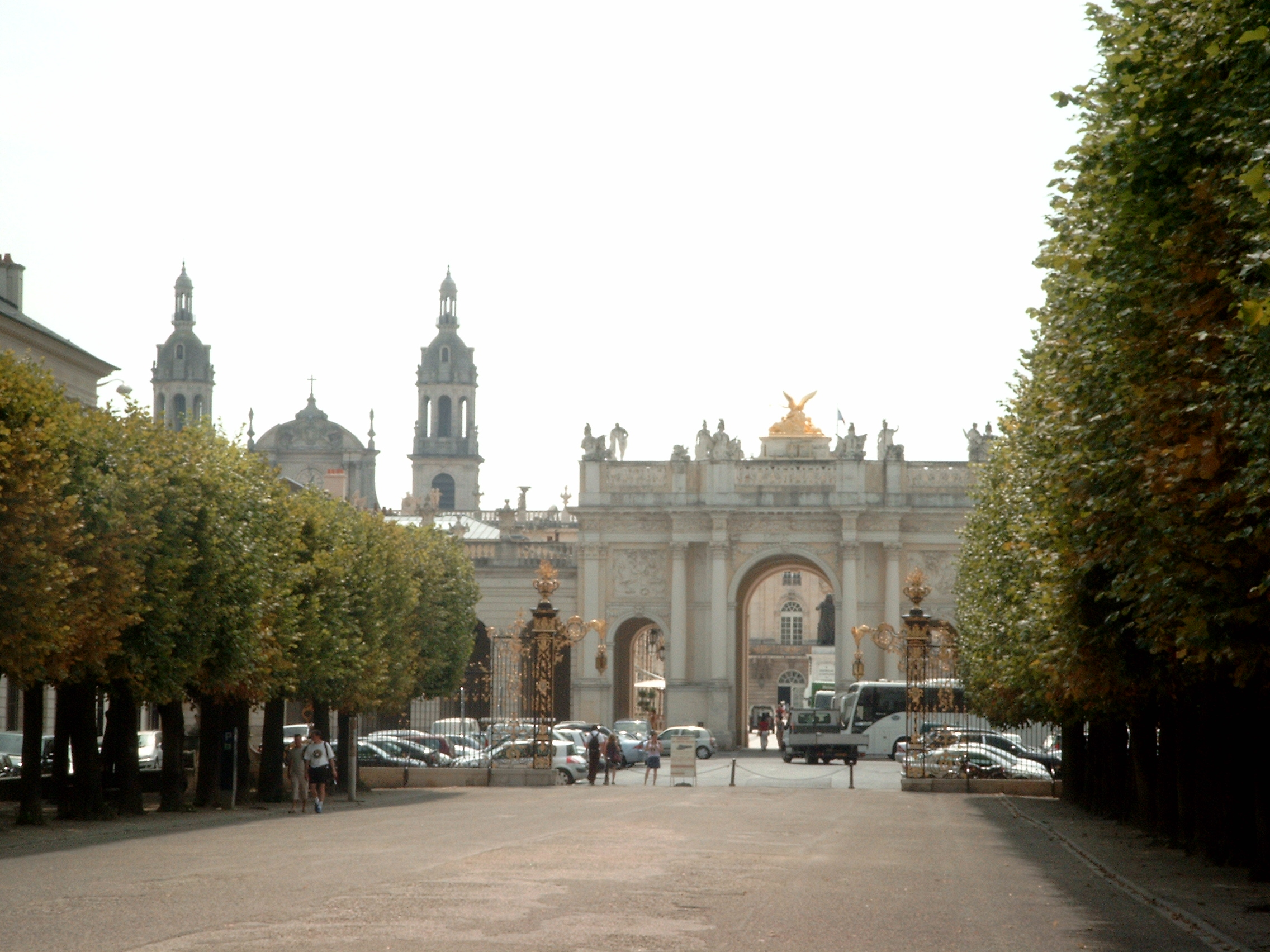 L'arc Héré et la cathédrale de Nancy